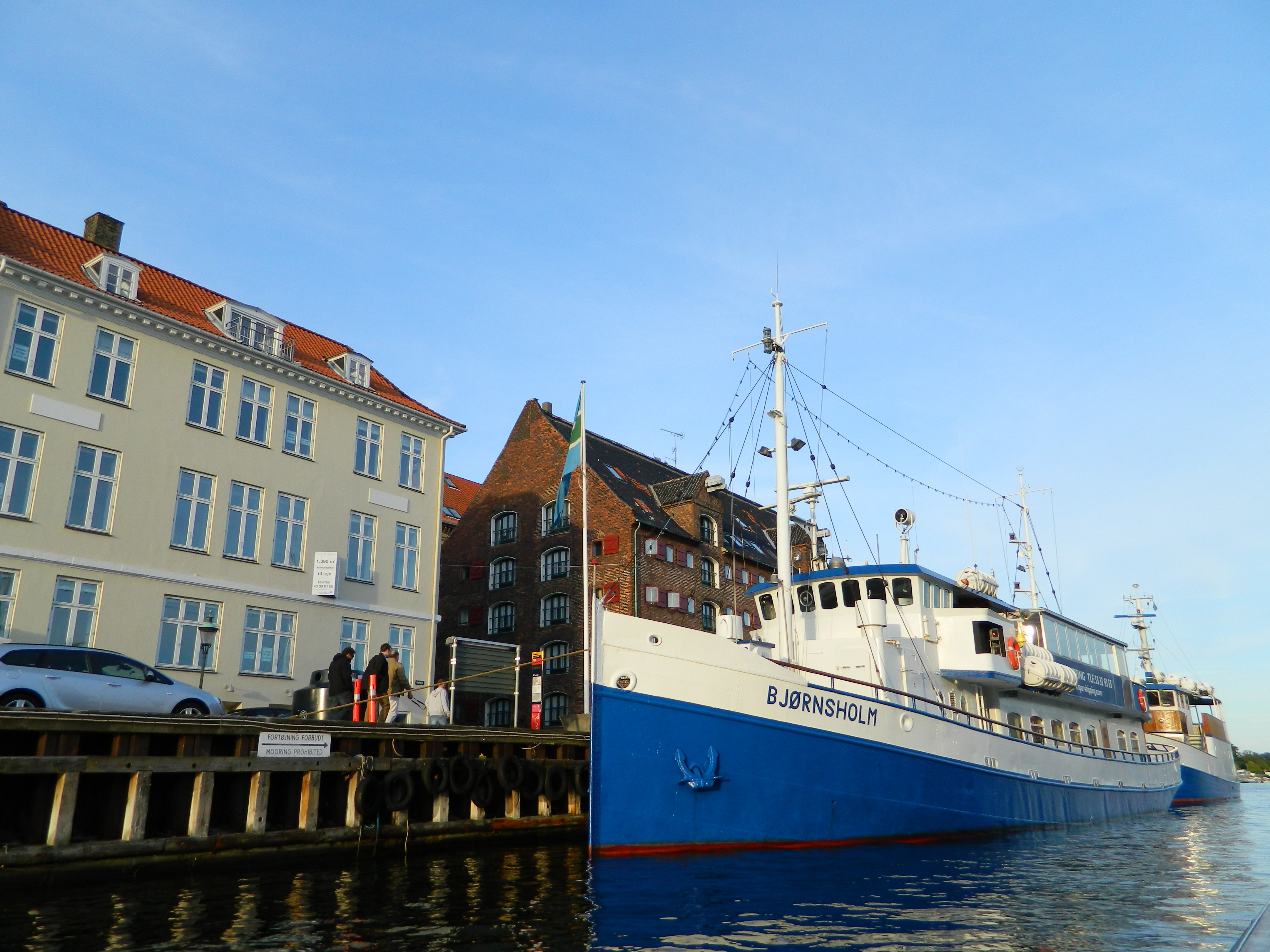 Copenhagen